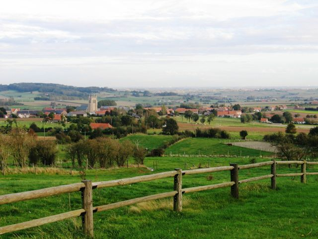 Heuvelland - eigen foto